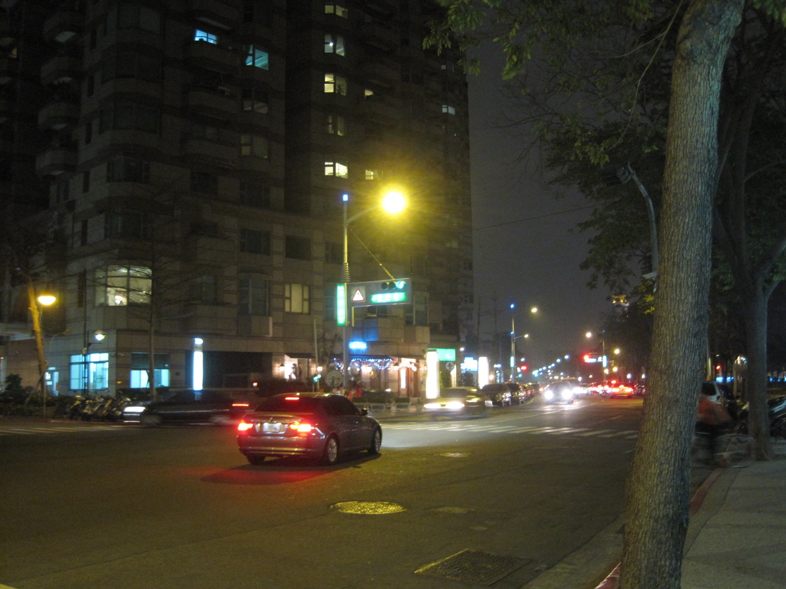 高雄市河堤路與明哲路口。